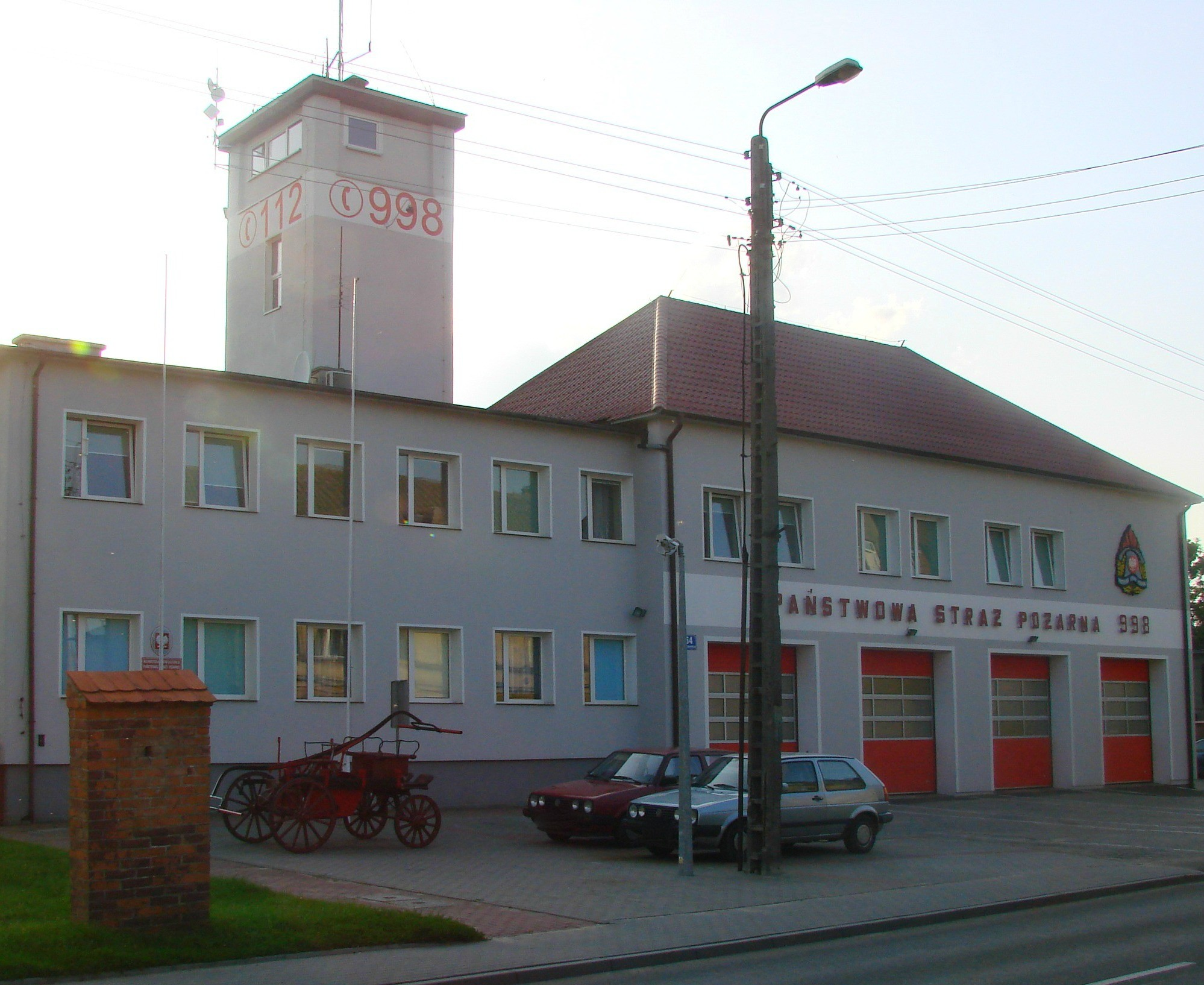 Budynek Państwowej Straży Pożarnej, przy ul. H. Sienkiewicza. Obiect in Sępólno Krajeńskie, Poland.